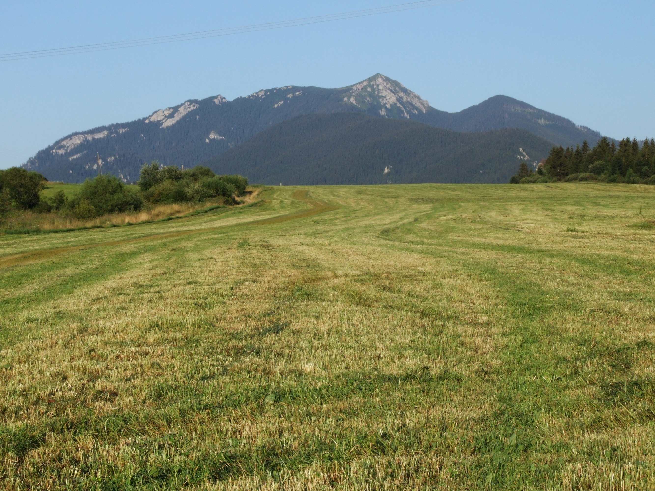 Widok z Zuberca (z wału Między Bory)